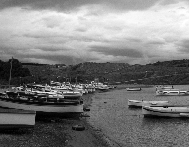 Port Lligat.Portlligat